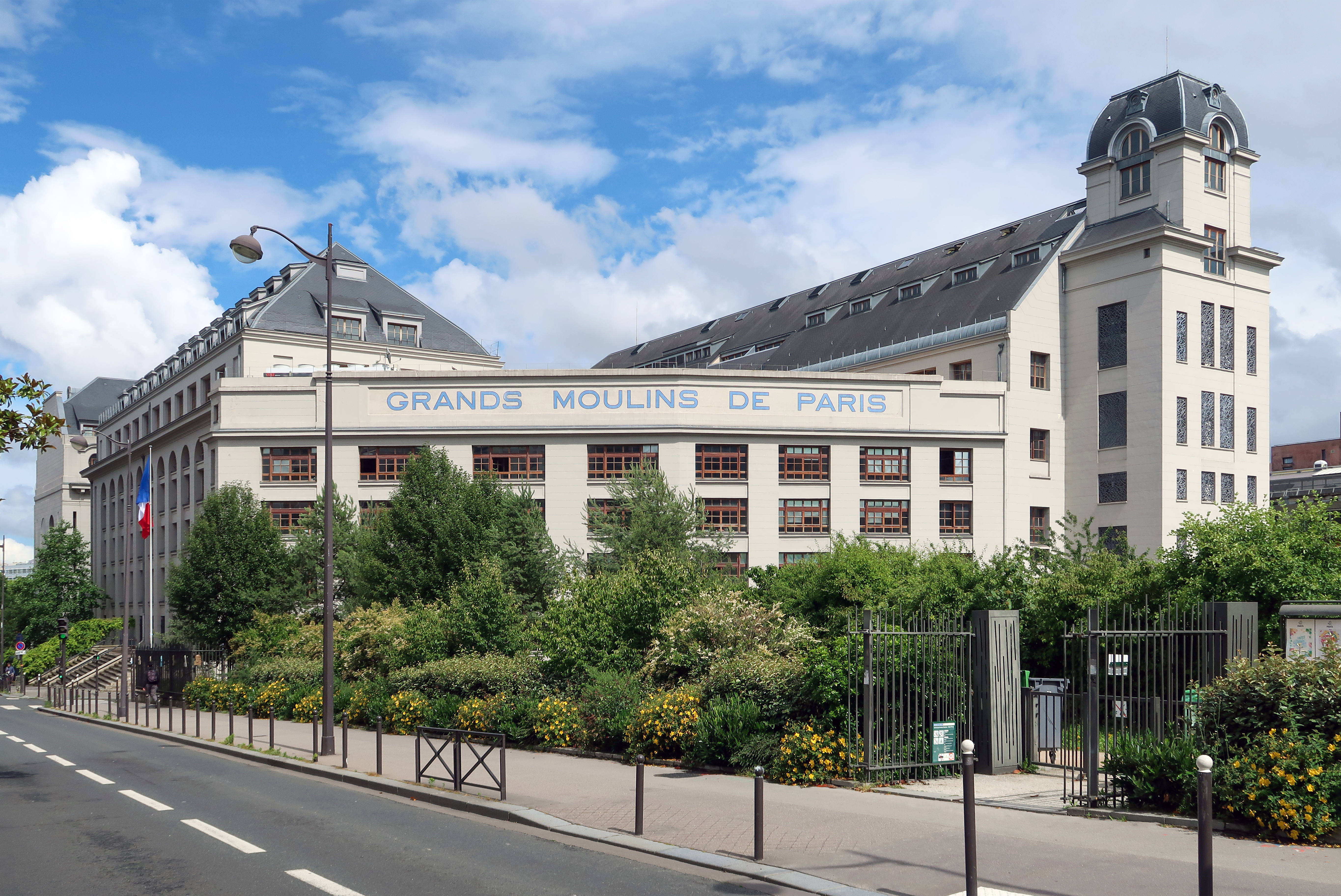 Grands Moulins de Paris vus de la rue Thomas-Mann (Paris, 13e).